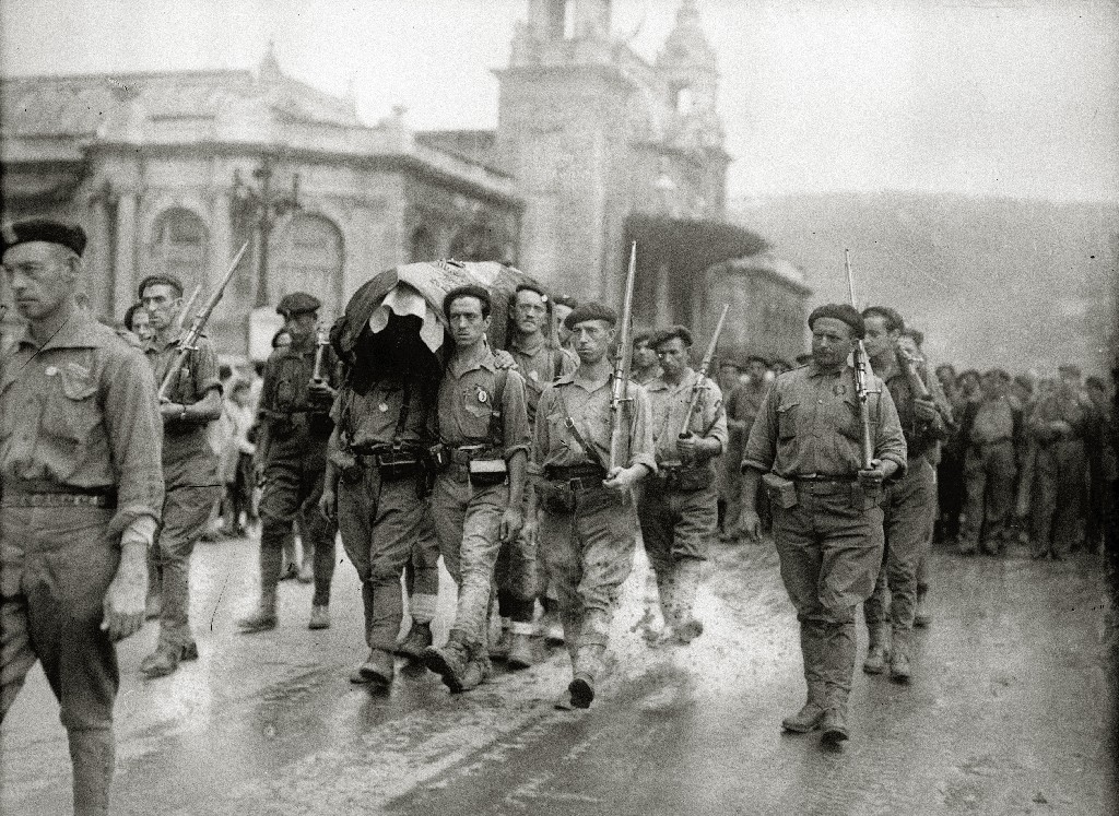 Título original: Soldados del bando nacional llevando a hombros un féretro por la avenida de la Zurriola (1/1) Localización: San Sebastián (Guipúzcoa)